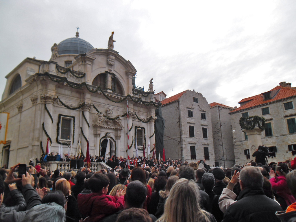 puštanje golubica, Kandelora, Dubrovnik 2. veljače 2014.